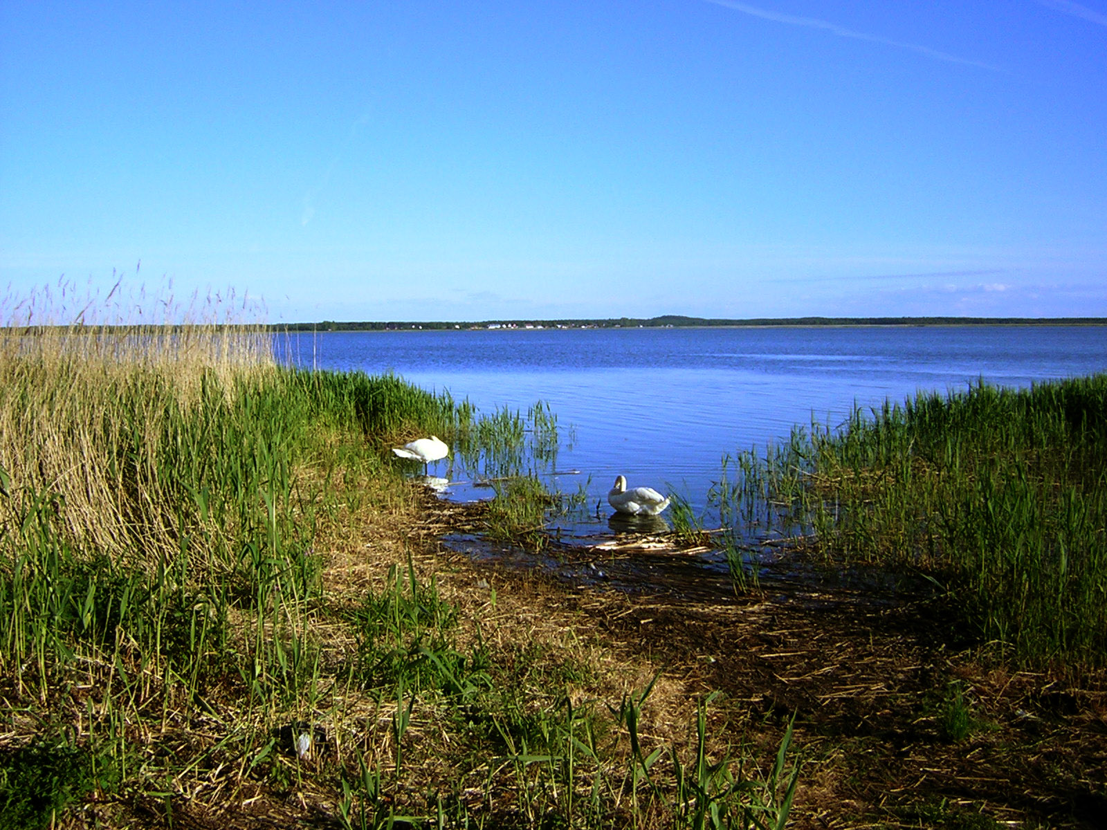 Jezioro Łebsko Autor: Marcin n MARCIN N 17:24, 8 June 2006 (UTC)